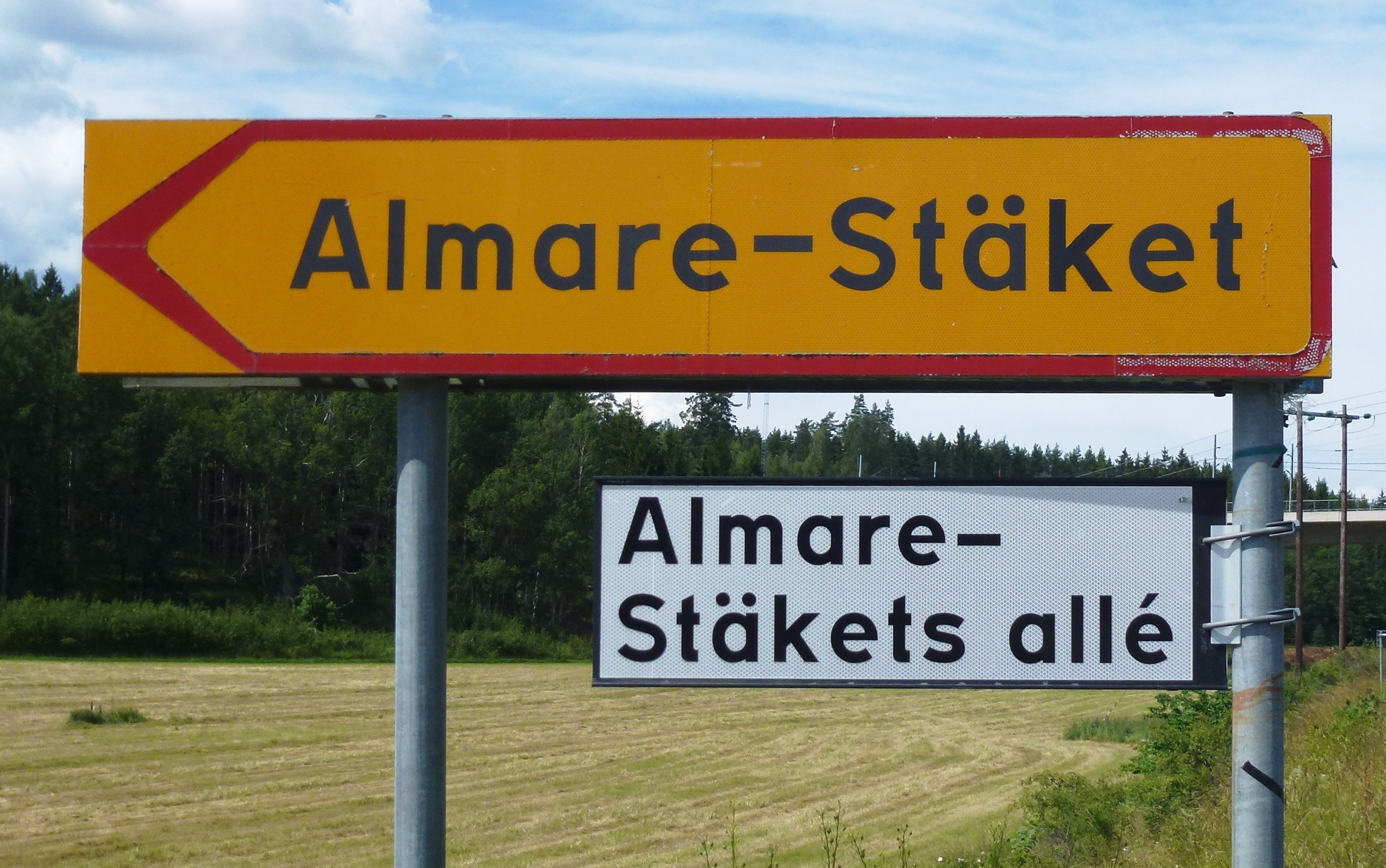 Almare-Stäket vägskylt på Stäksön